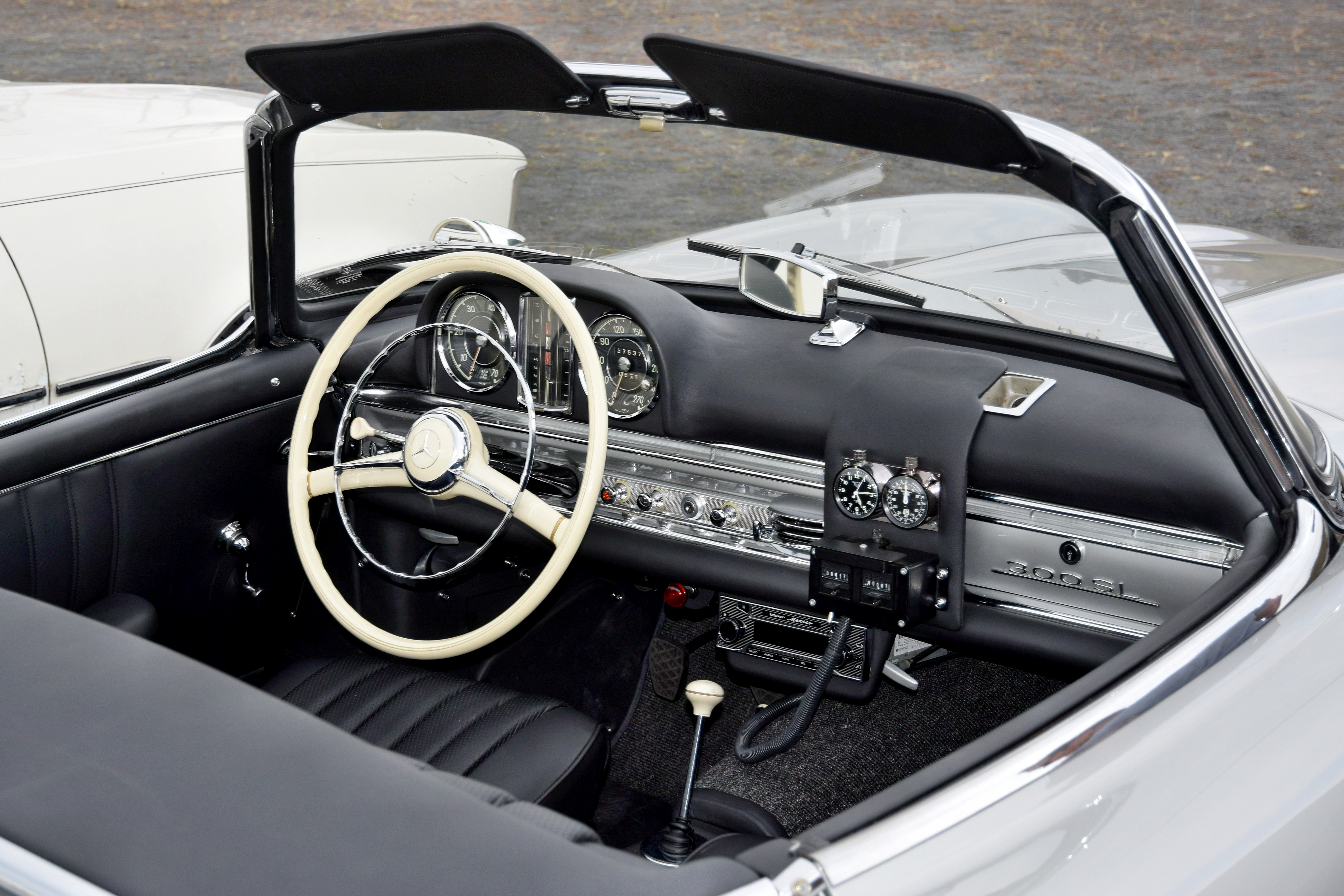 Interieur eines Mercedes 300 SL Roadster